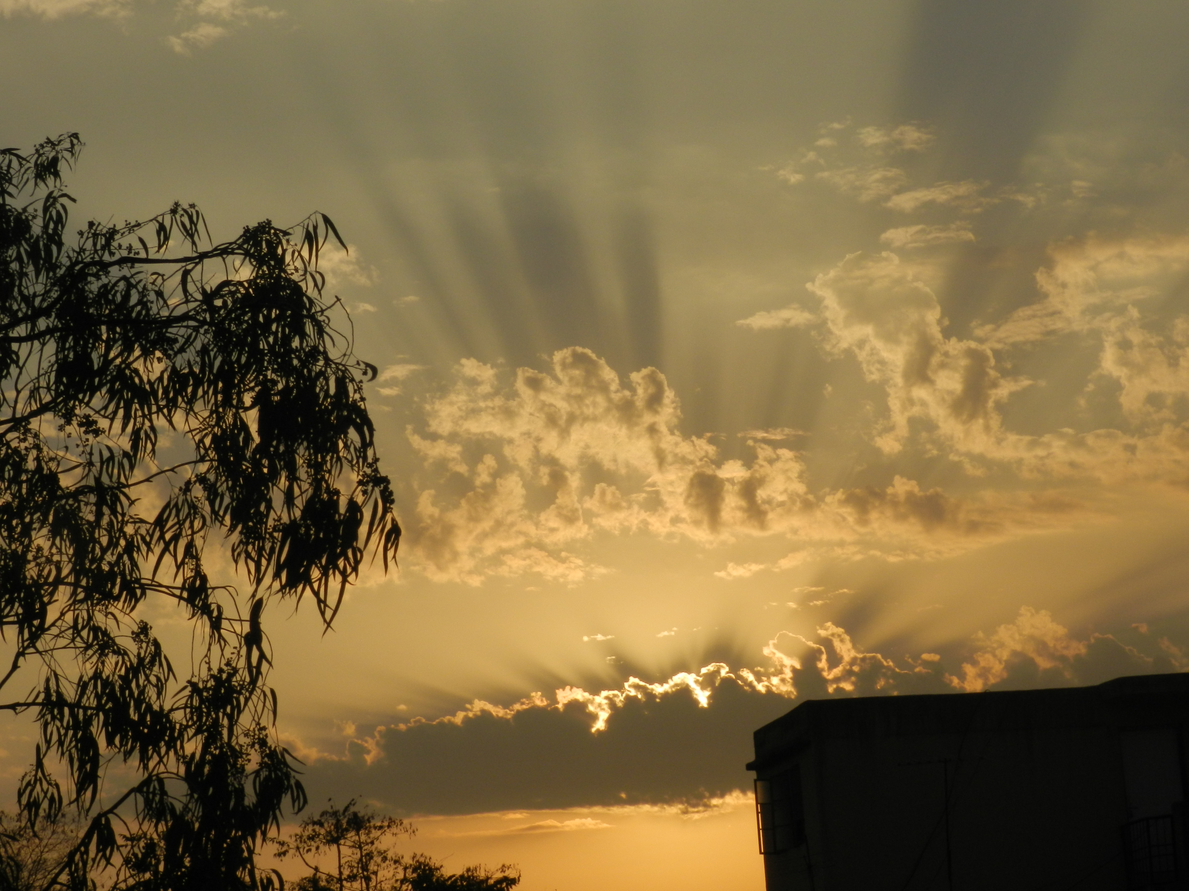 पुणे येथून सूर्यासमोर राशीमेघ आल्यामुळे दिसलेला छायाप्रकाशाचा खेळ